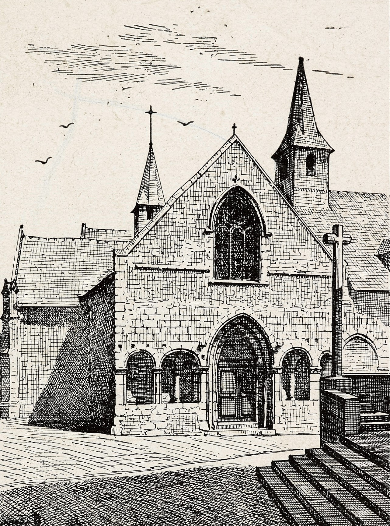 Ancien hôpital Saint-Nicolas à Fougères (Ille-et-Vilaine)